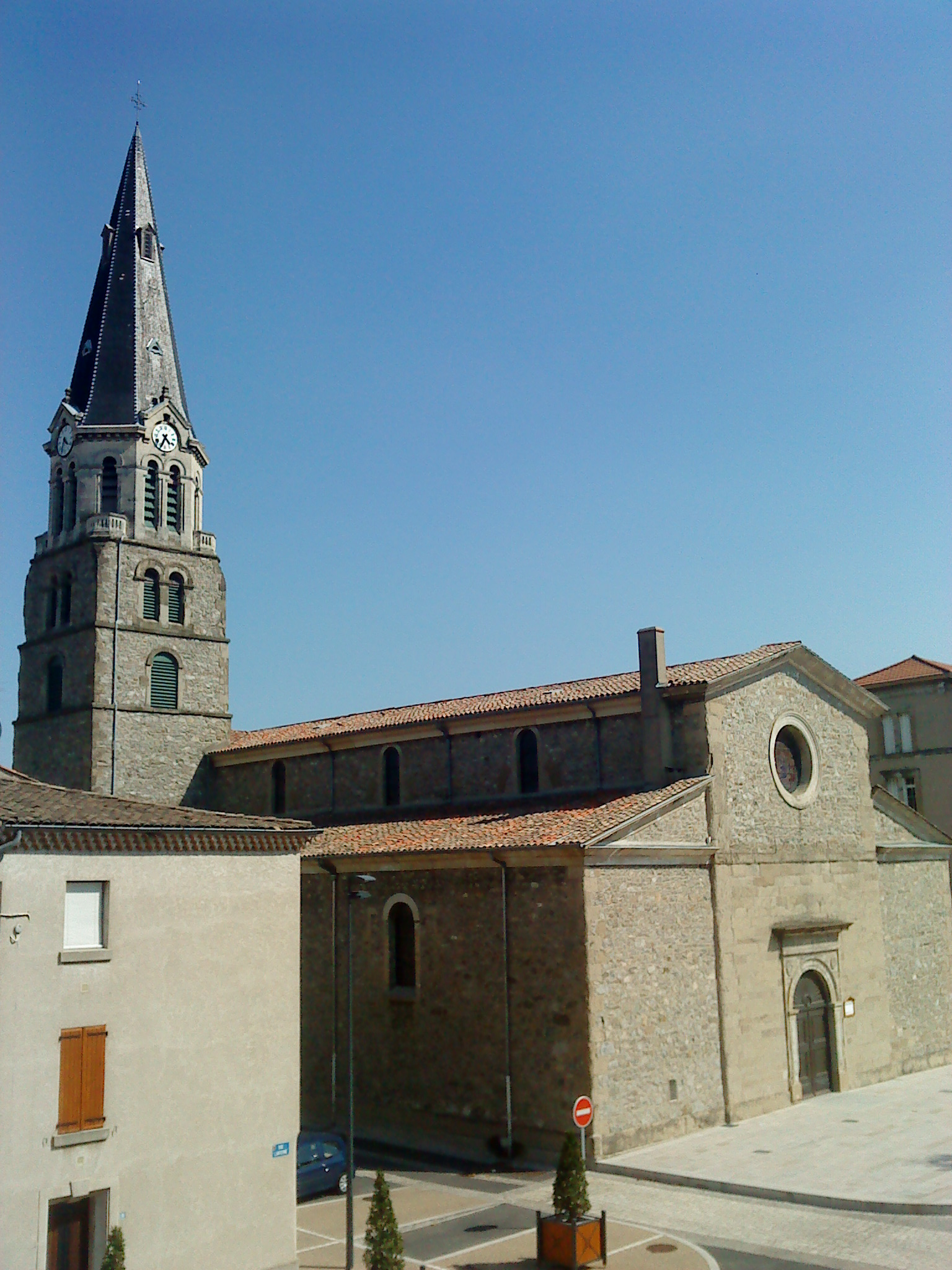 Eglise Saint-Vincent, Tain l'Hermitage